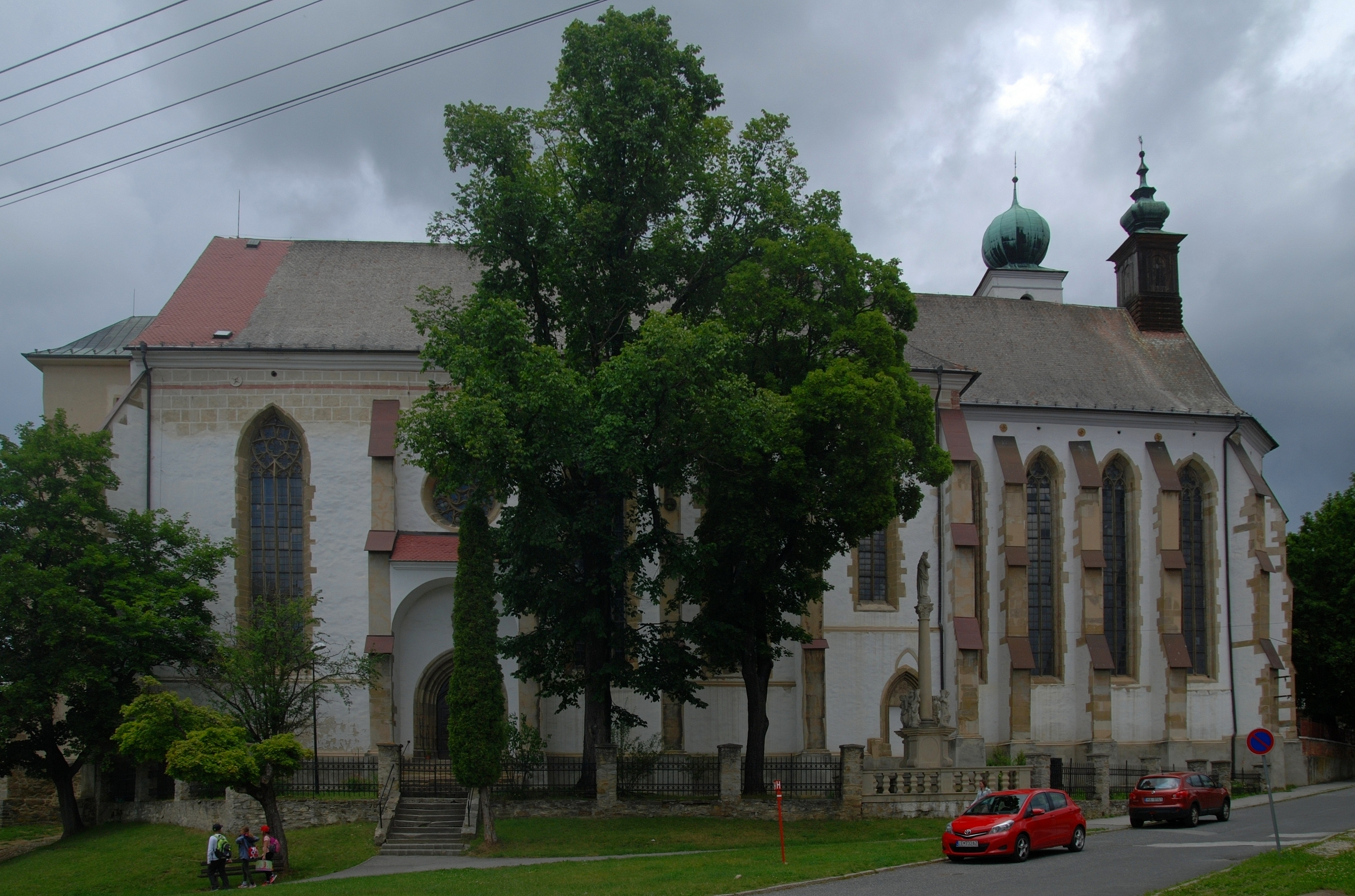 miasto Levoča